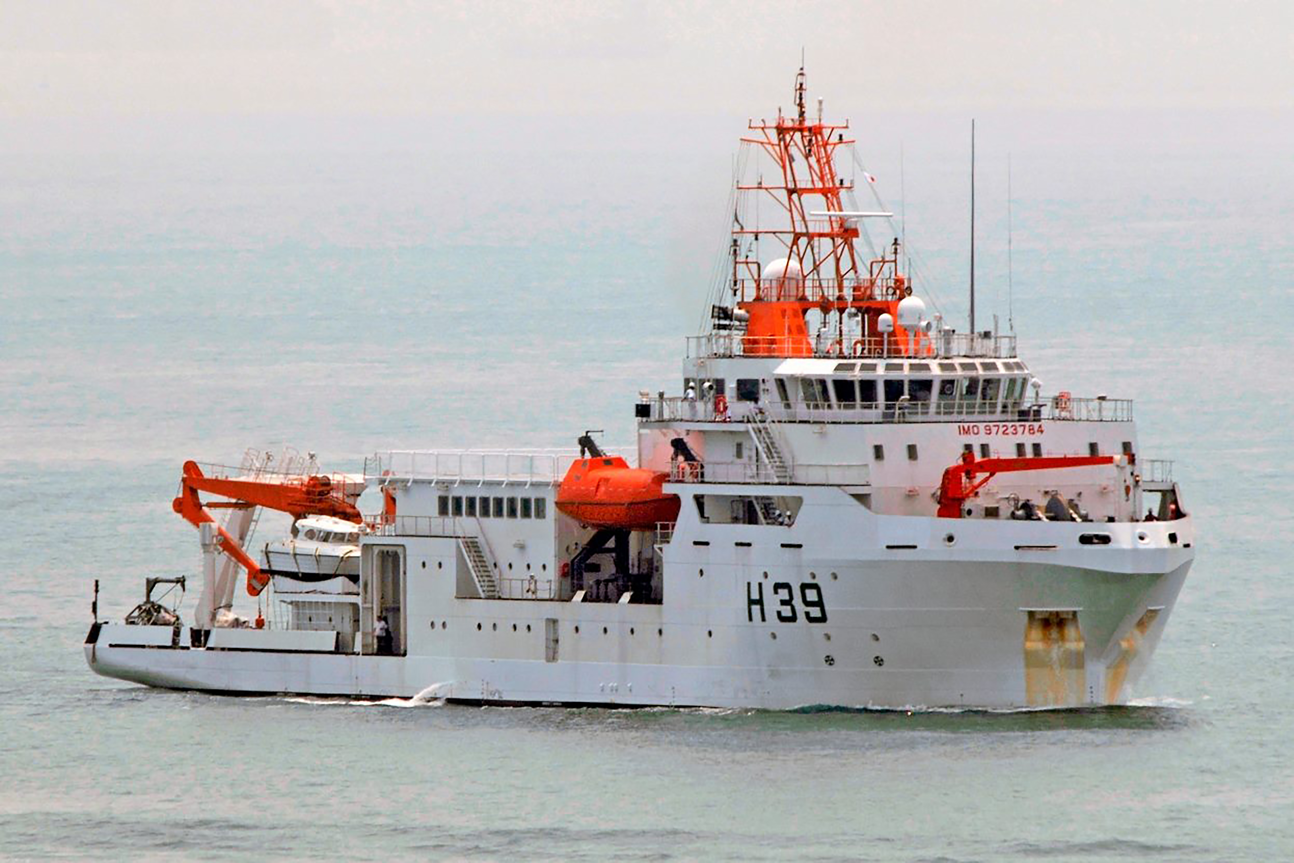 Arquivo liberado pela Marinha do Brasil através de projeto GLAM com Wiki Educação Brasil